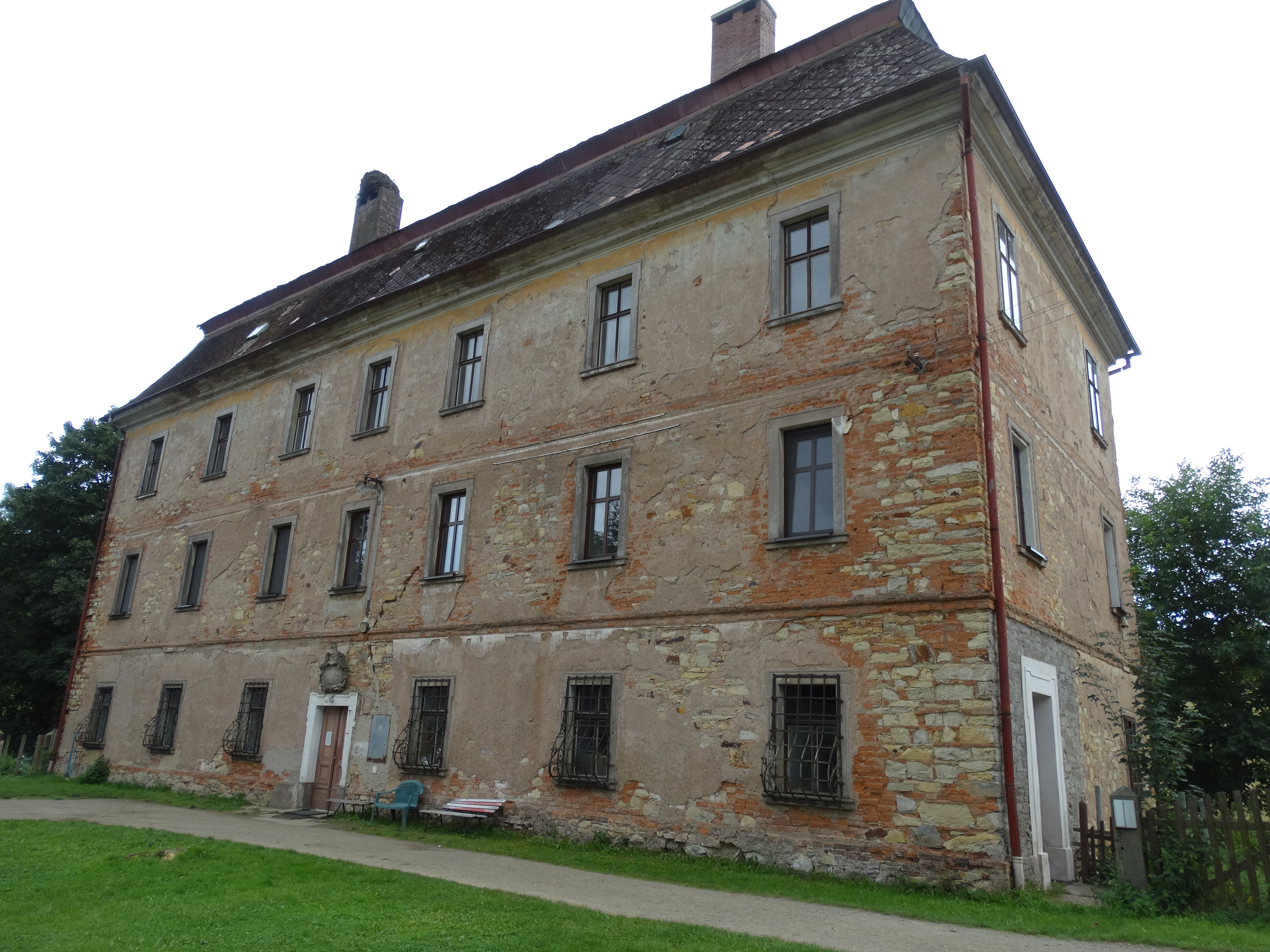 fara